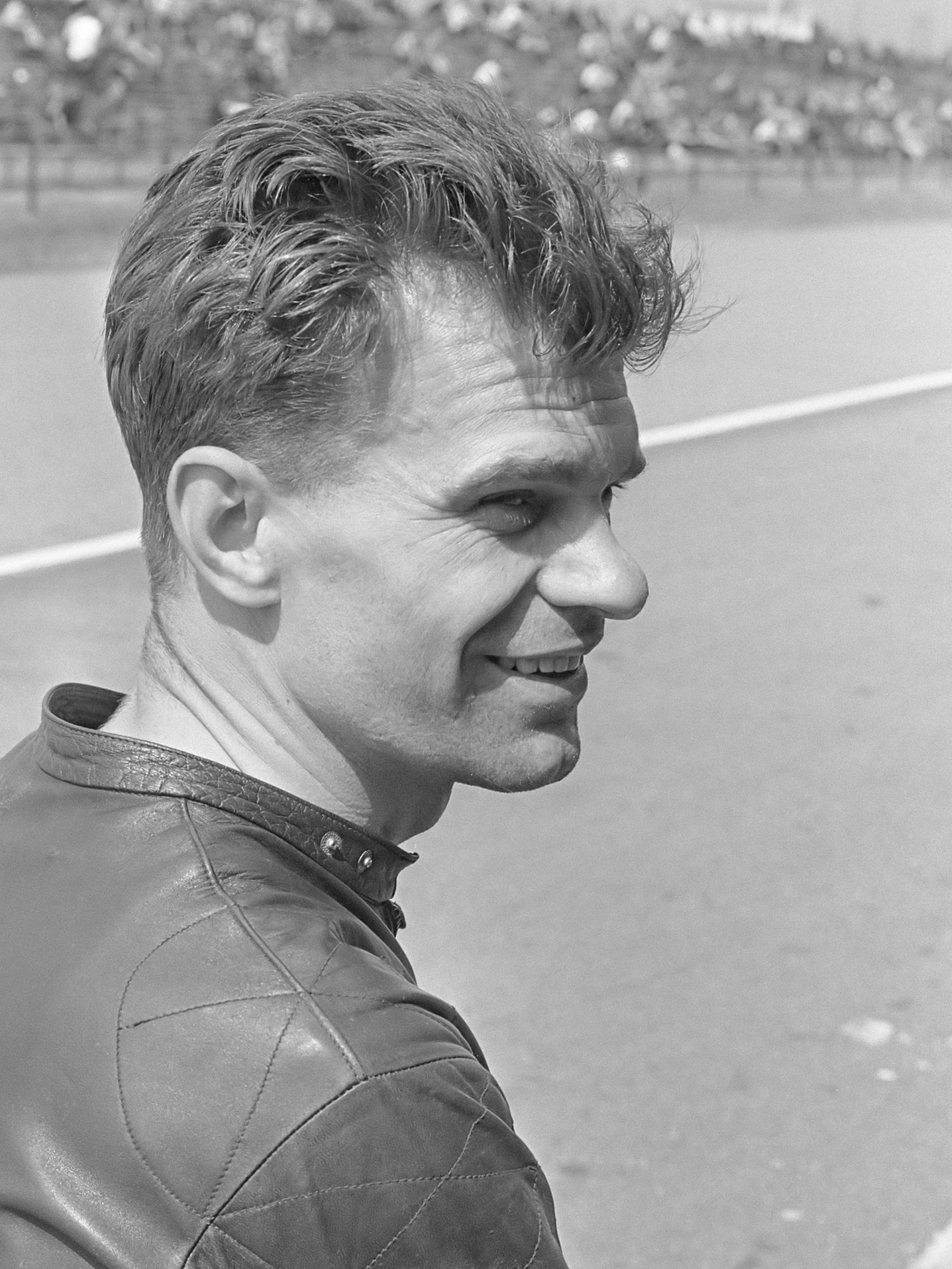 TT te Assen, training. Cees van Dongen uit Rotterdam, die een 8e plaats haalde in de 125cc klasse 22 juni 1966